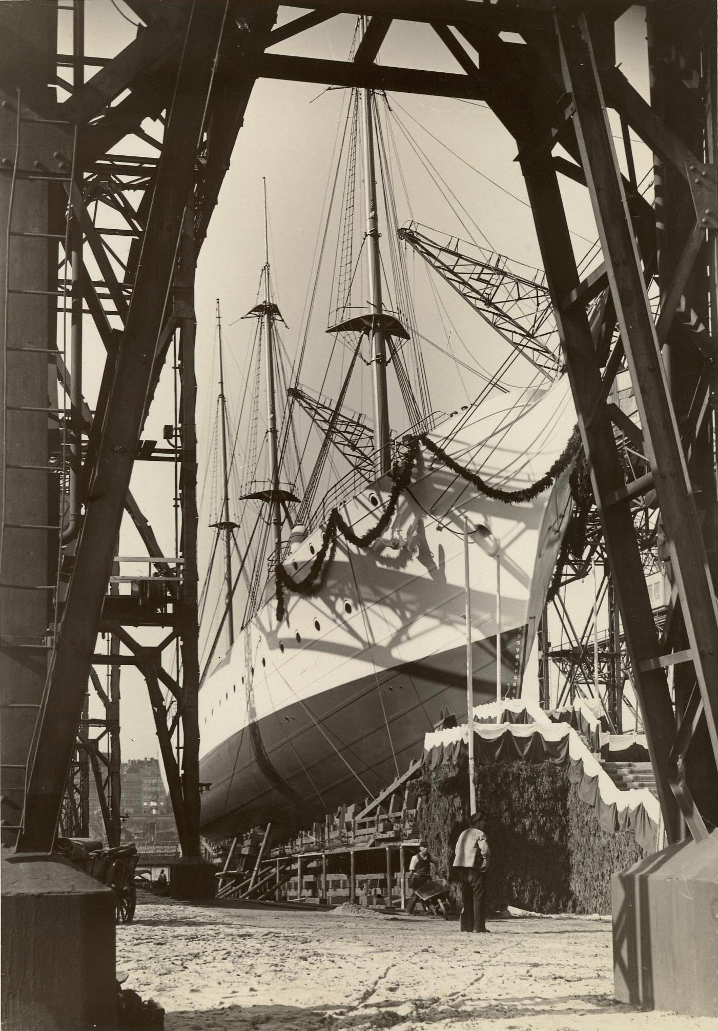 Stapellauf der Horst Wessel; heute Eagle